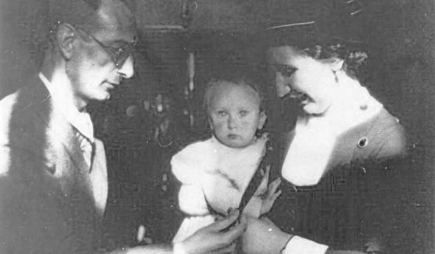 Luís Pimentel, Pilar Cayón e Rula.